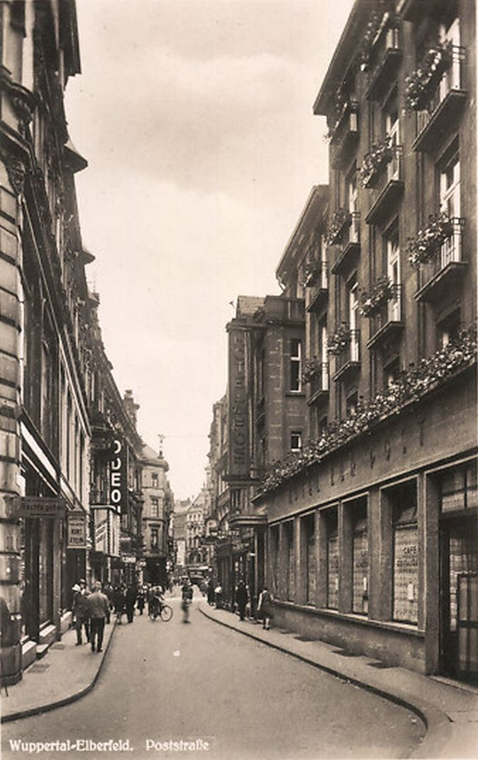 Wuppertal-Elberfeld, Poststr. mit Odeon und Hotel zur Post, Postkarte von 1937.